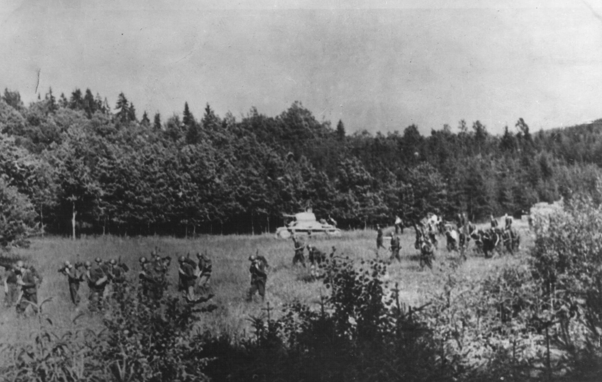 Srpskohrvatski / српскохрватски: Italijanska vojska u ofanzivi na Kočevskom, Slovenija 1942.